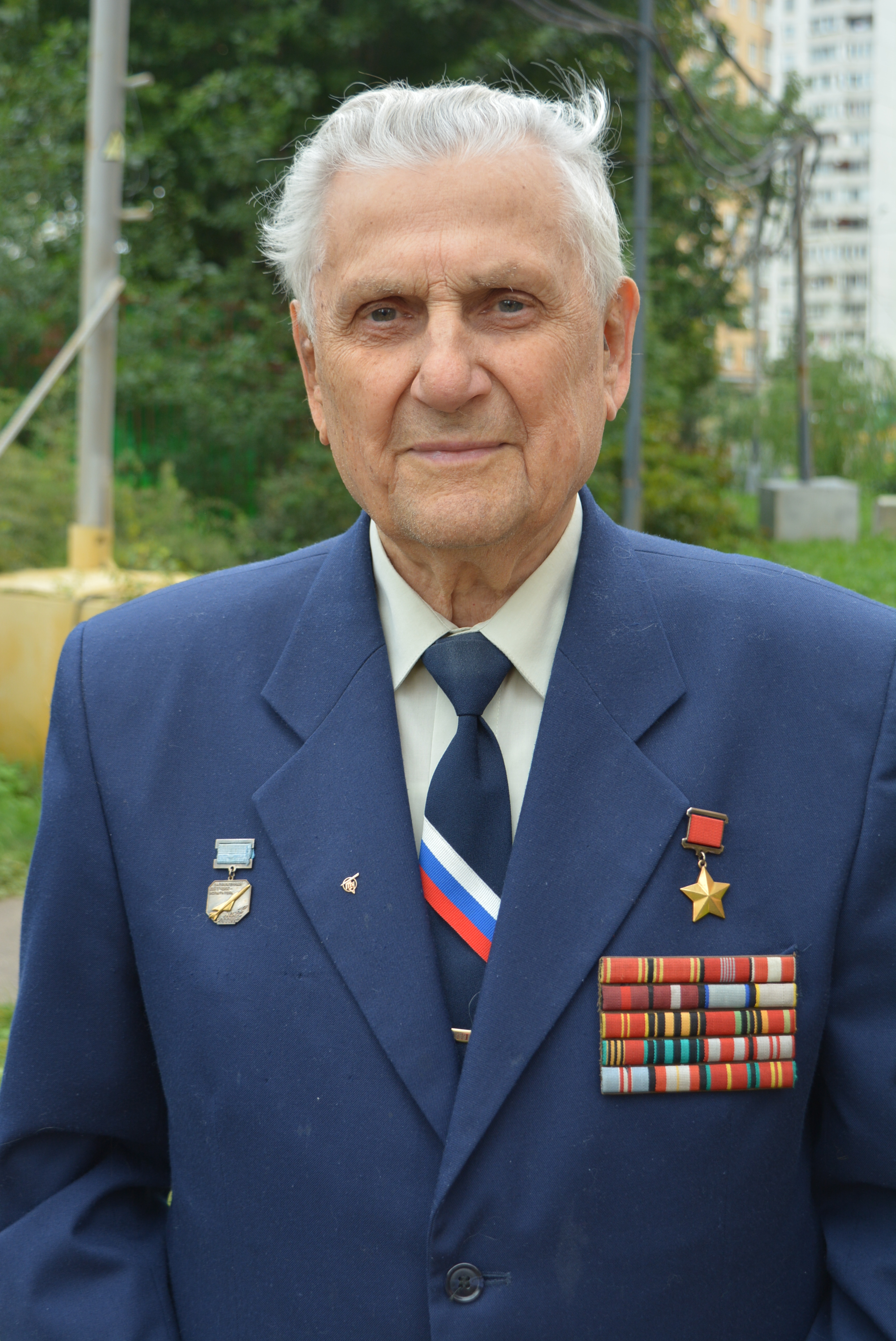 Герой Советского Союза Иван Корнеевич Ведерников. 2016 год.